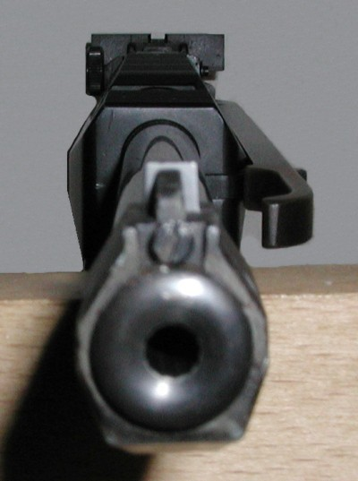 Kimme und Korn Motiv: Kimme (Hintergrund) und Korn (Vordergrund) bei einer Luftpistole Foto: Wilfried Wittkowsky, 2005